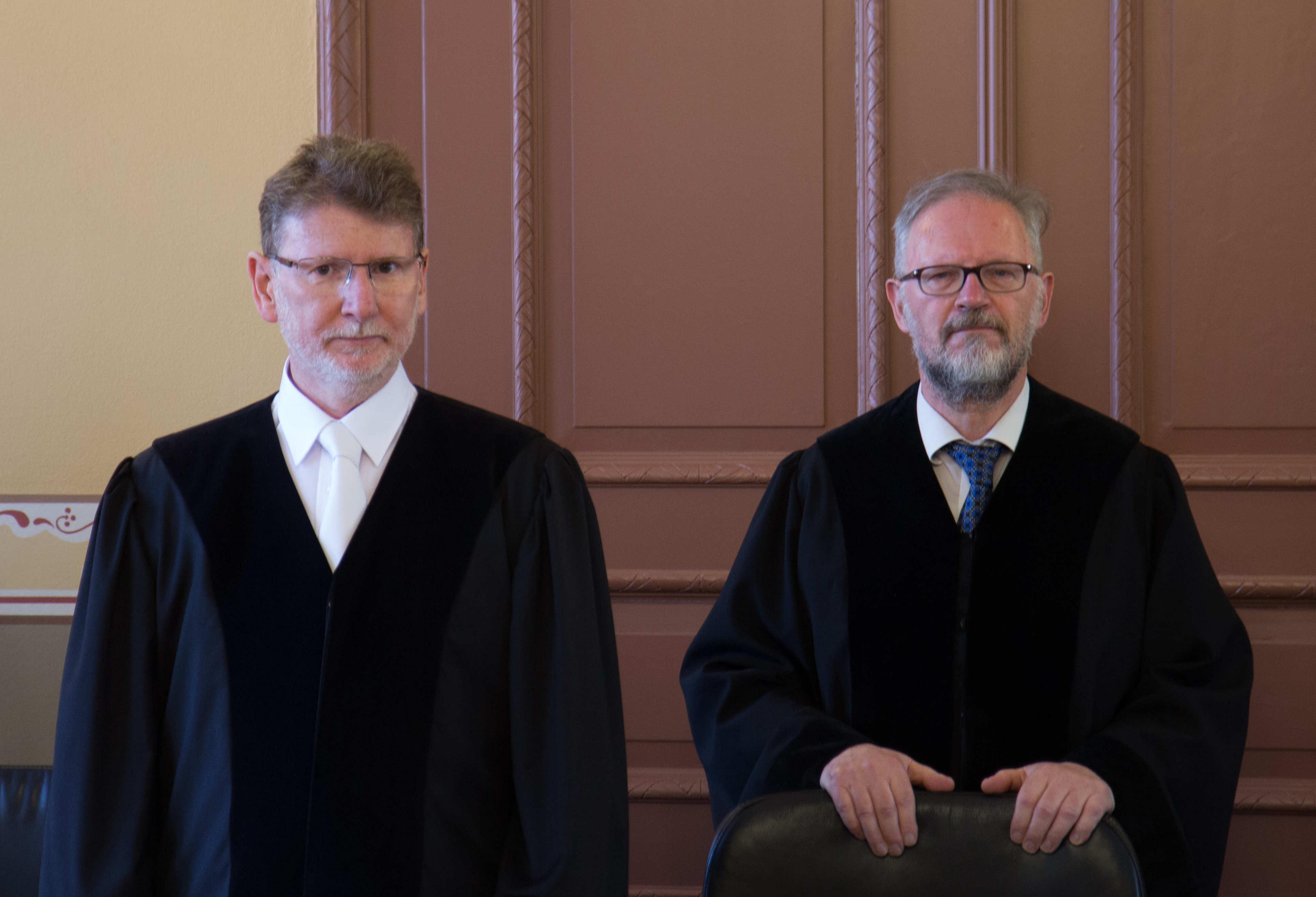 Thüringer Verfassungsgerichtshof. Öffentliche Sitzung am 14. Juni 2017 in Weimar